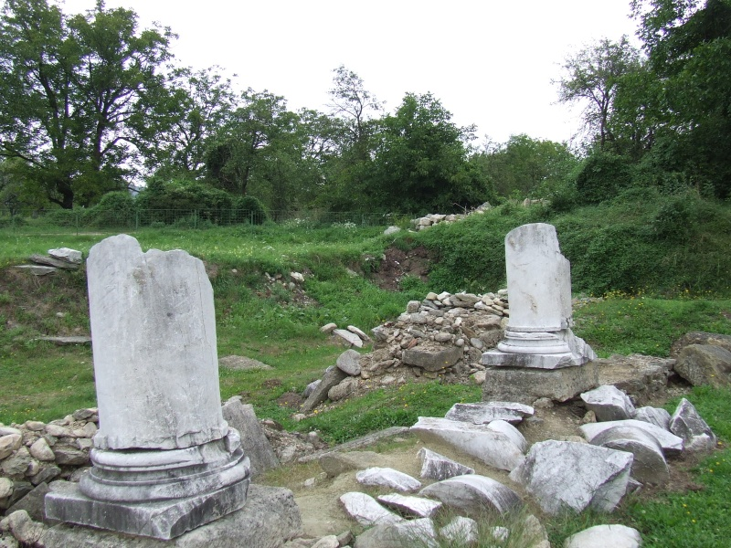 Sarmizegetuza, Hunedoara County, Romania